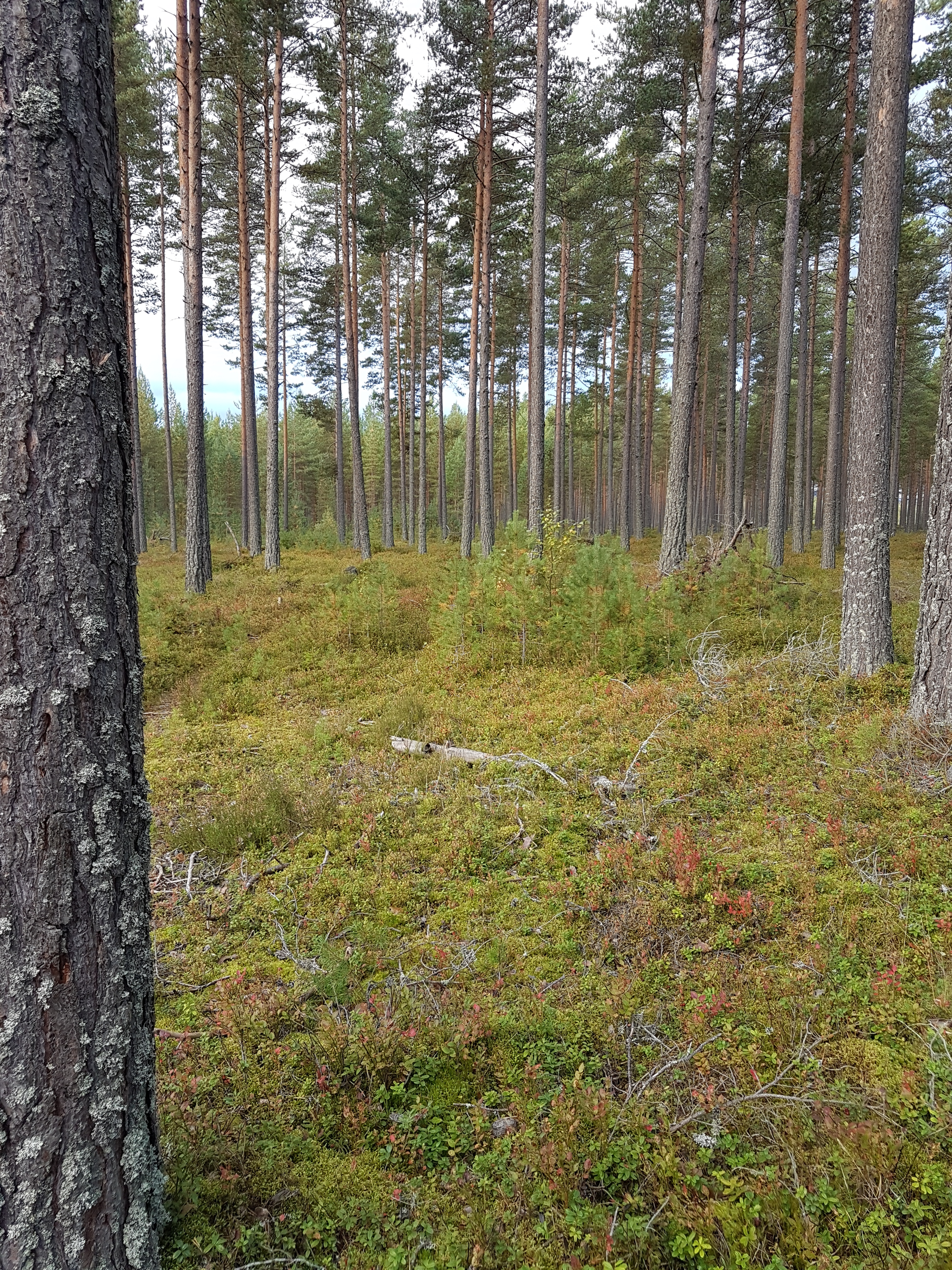 Sandfuruskog ved Grønvollmoen i Ådal